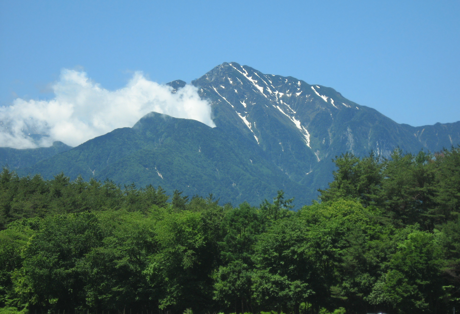 北杜市より望む甲斐駒ヶ岳